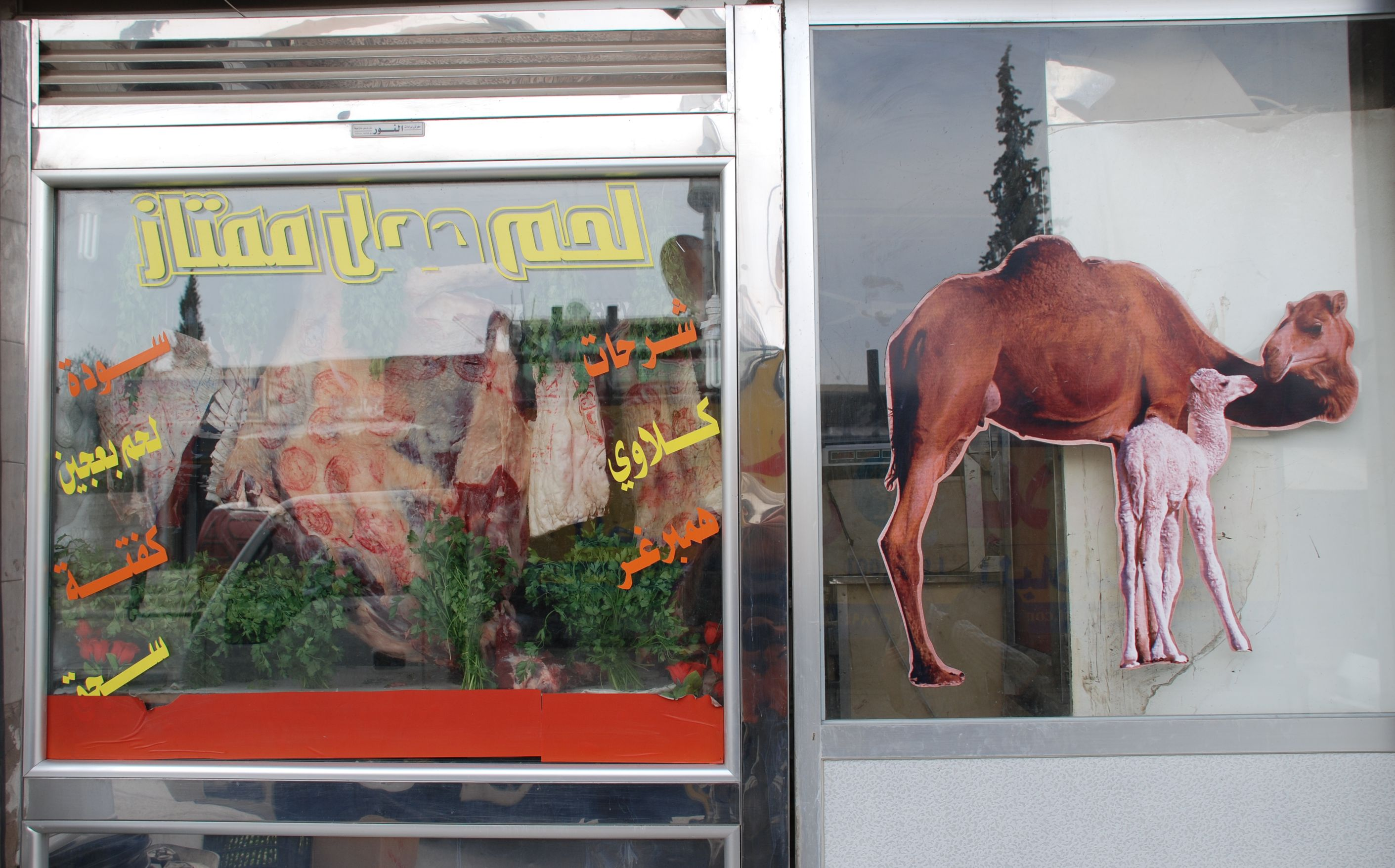 Schaufenster einer Metzgerei für Kamelfleisch in Ad Dumair, Syrien